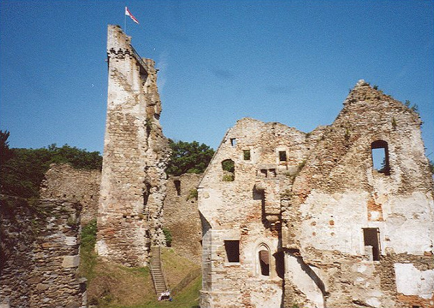 Ruine Schaunberg - Bergfried und Palas